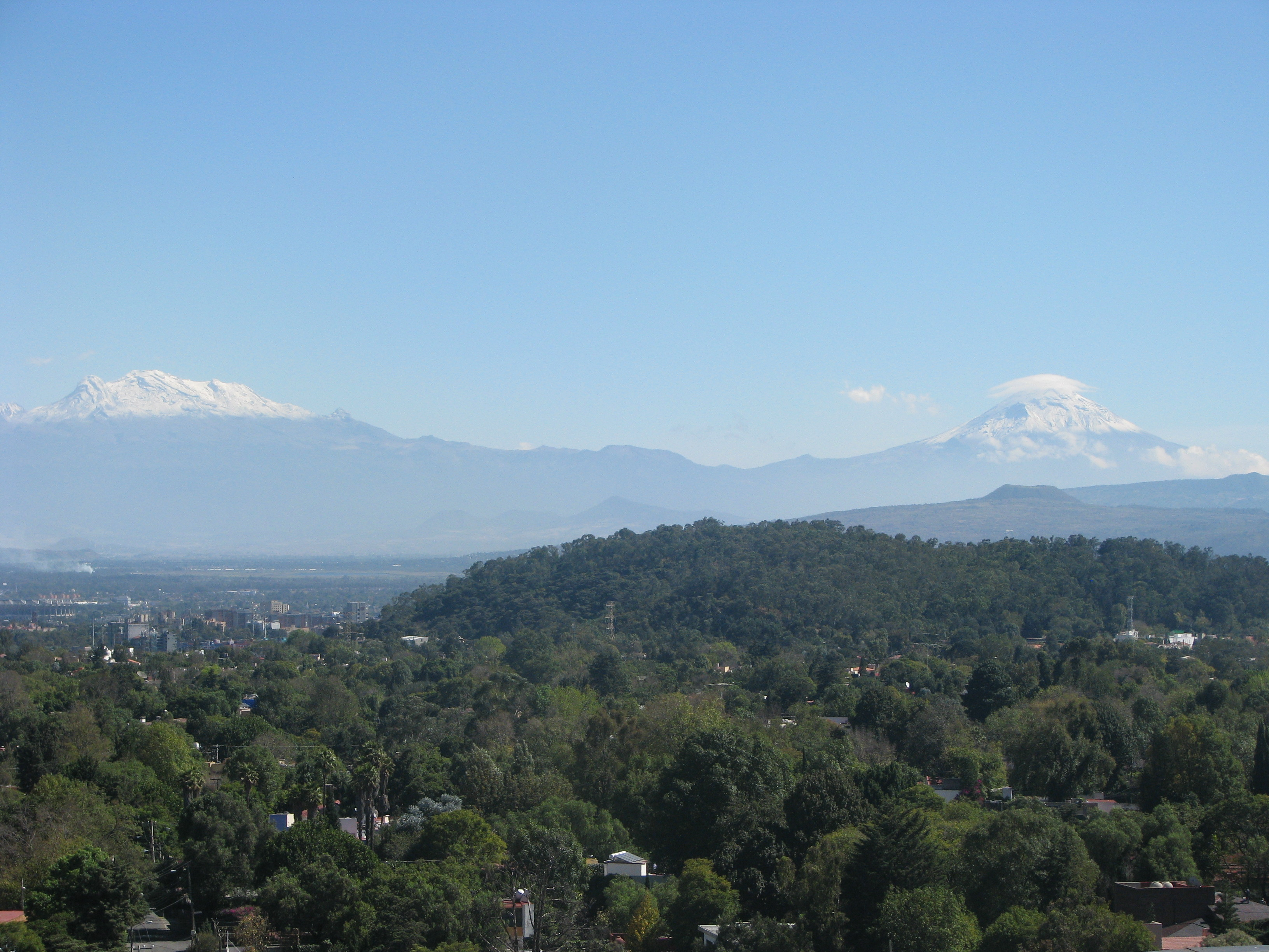 La historia de amor más eterna de nuestro valle.